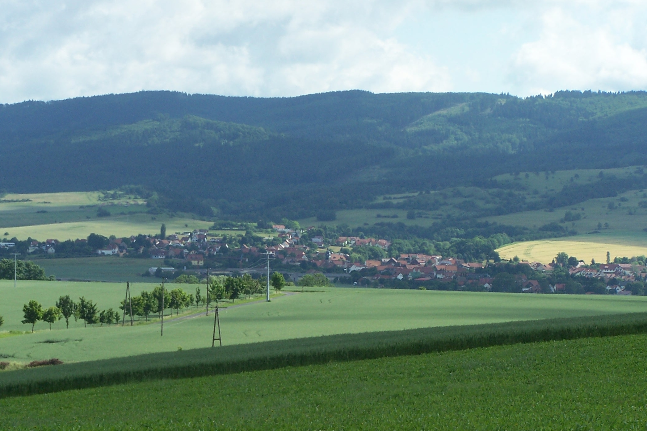 Gesamtansicht von Süden (Panoramahotel).